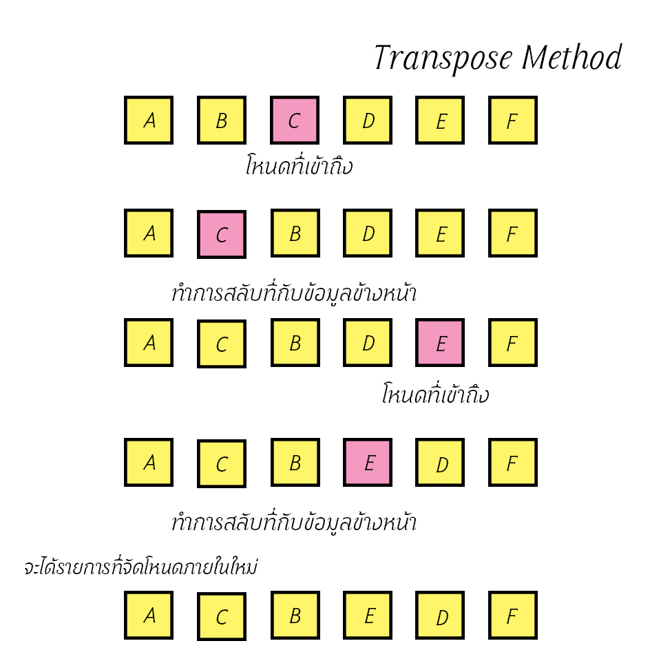 ขั้นตอนวิธีจัดโหนดภายในรายการแบบ Transpose Method